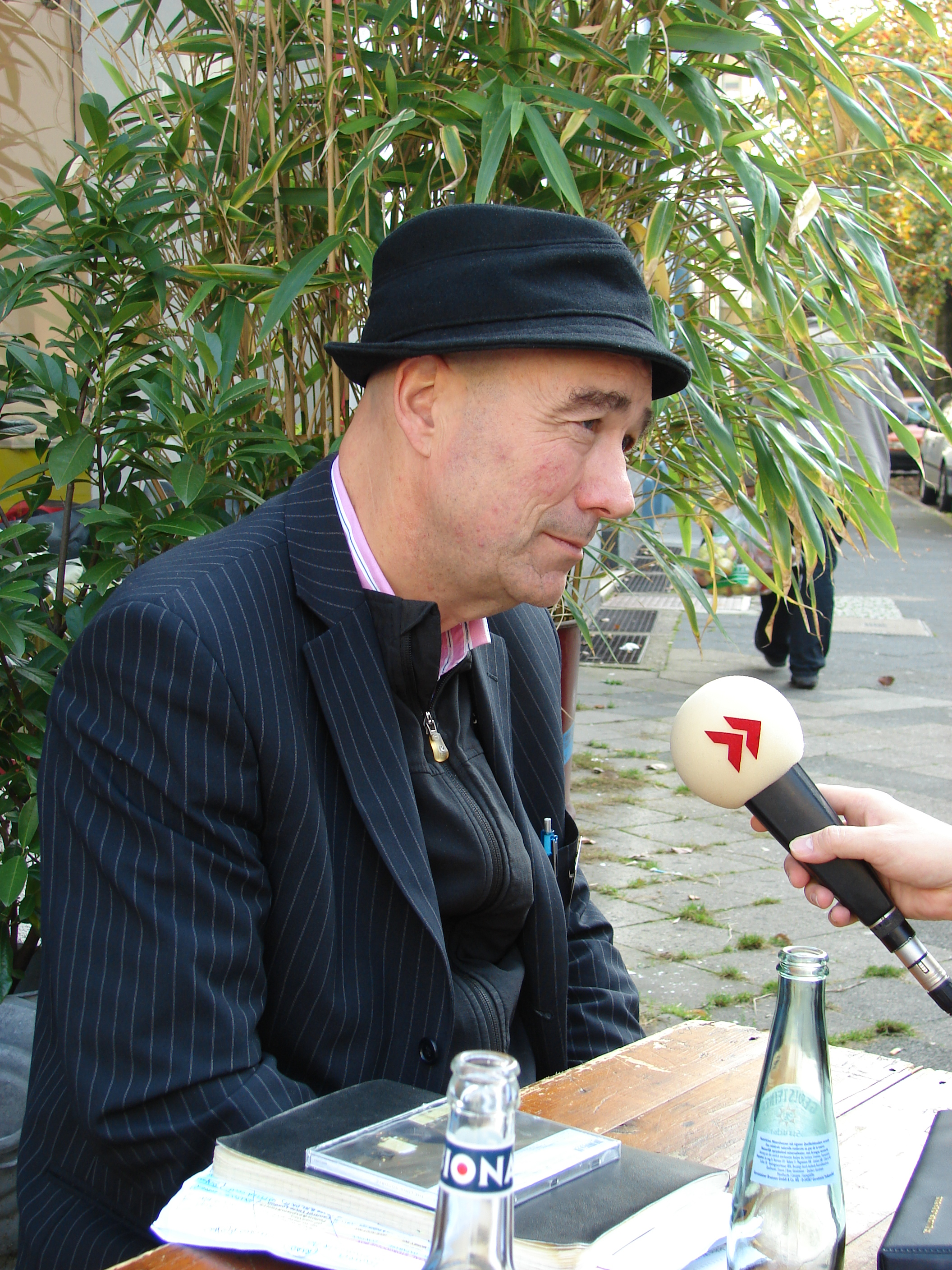 John Watts beim Radio-Interview; Düsseldorf 2008